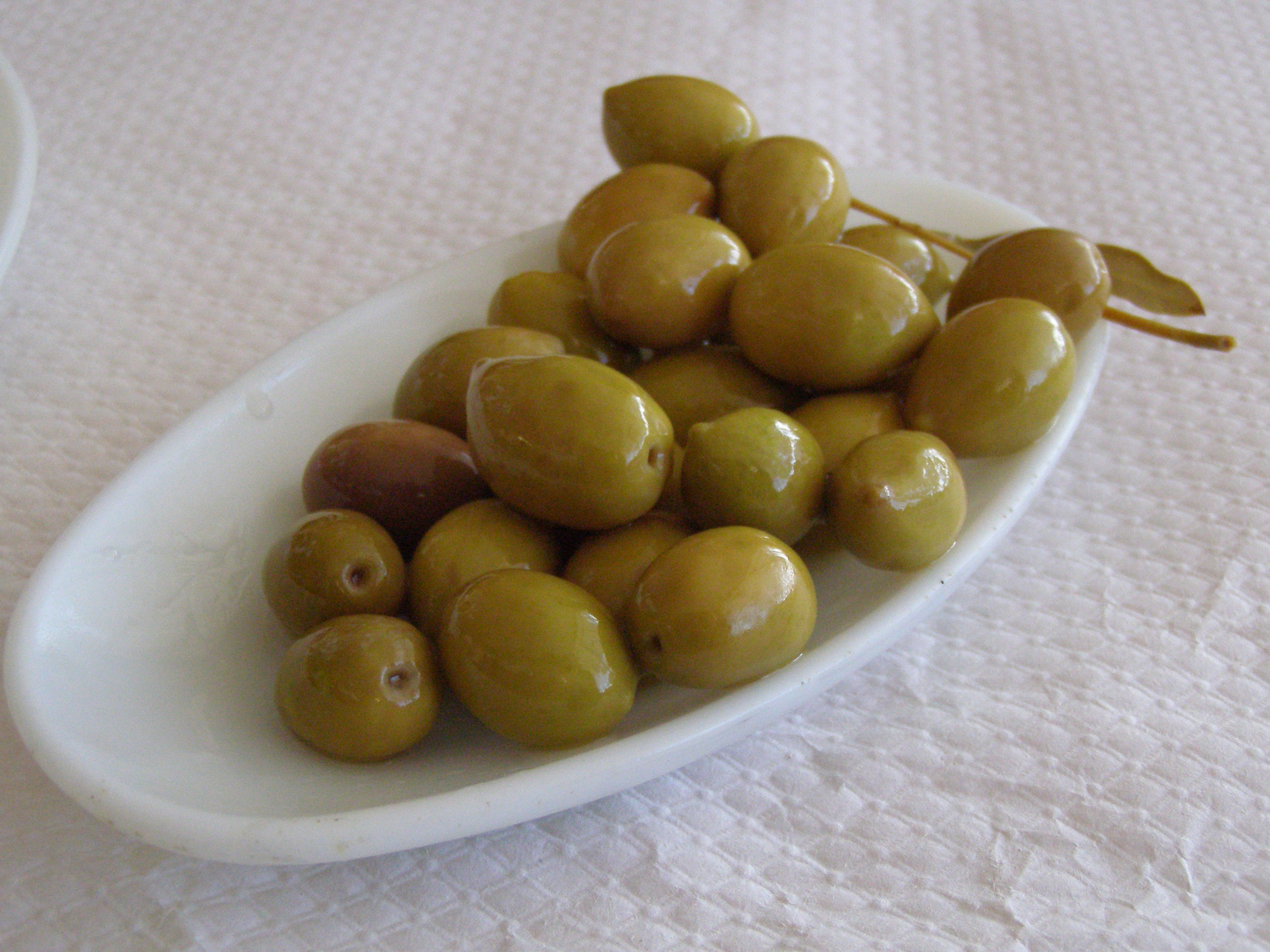 Una ración de aceitunas.